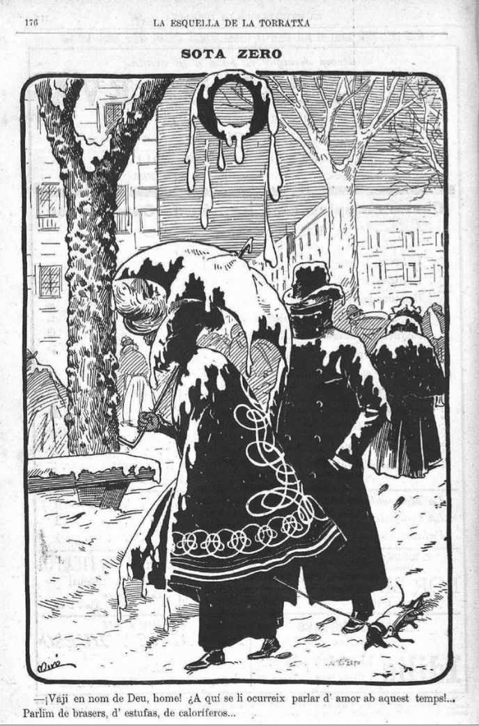 Página de la revista La Esquella de la Torratxa